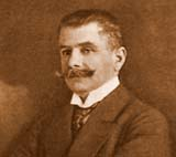 Foto von Oskar Troplowitz